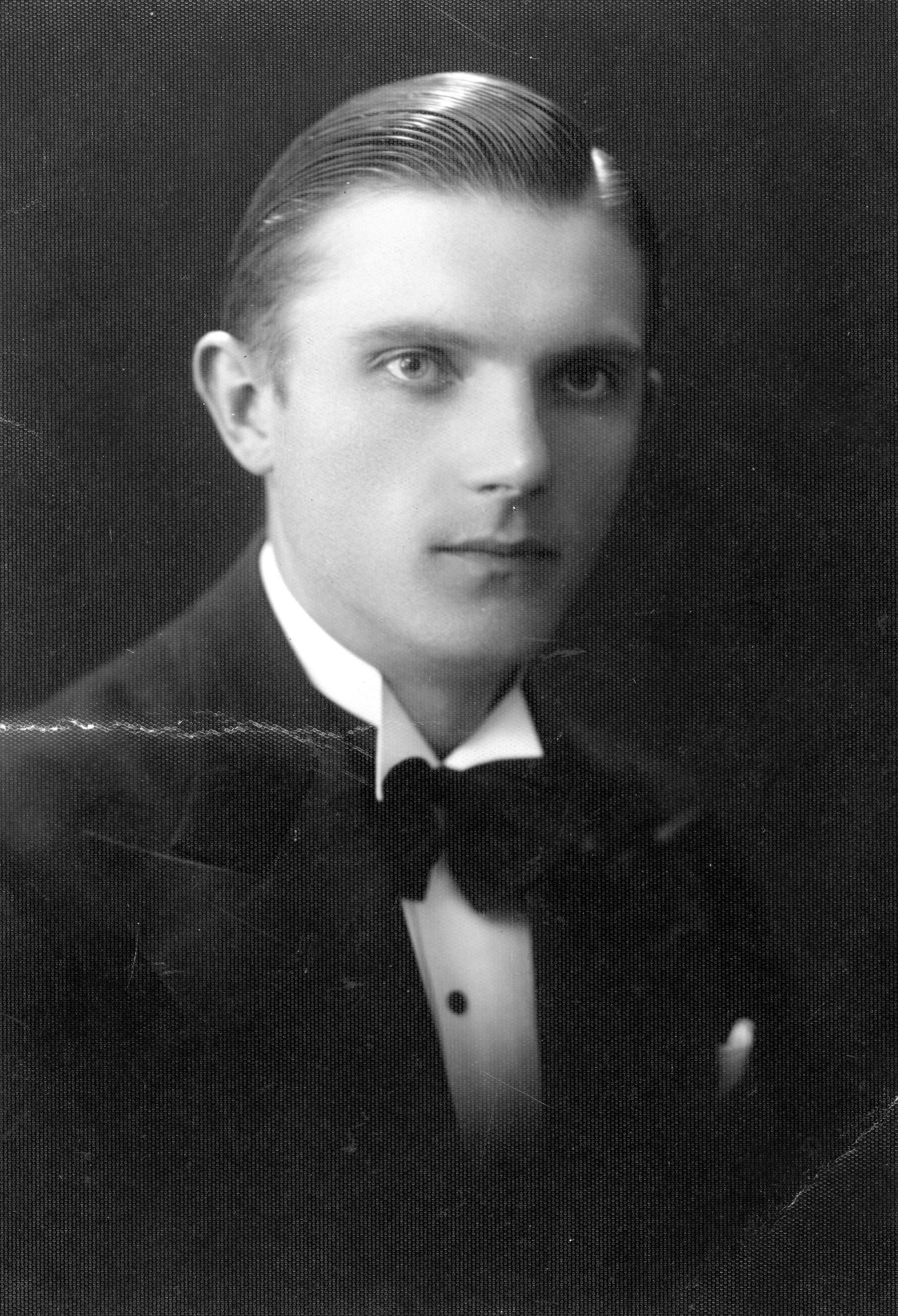 Antanas Bendorius